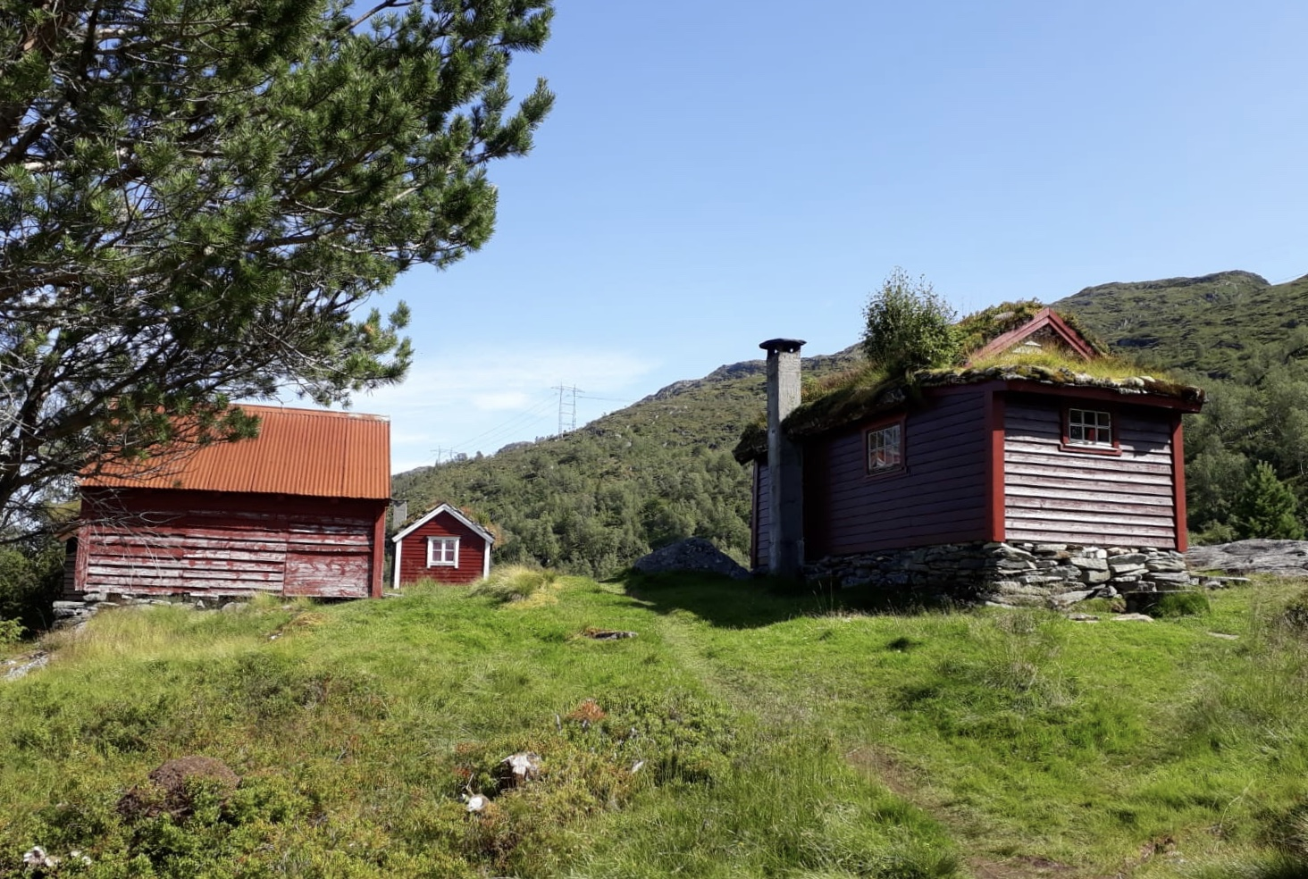 Ossætra